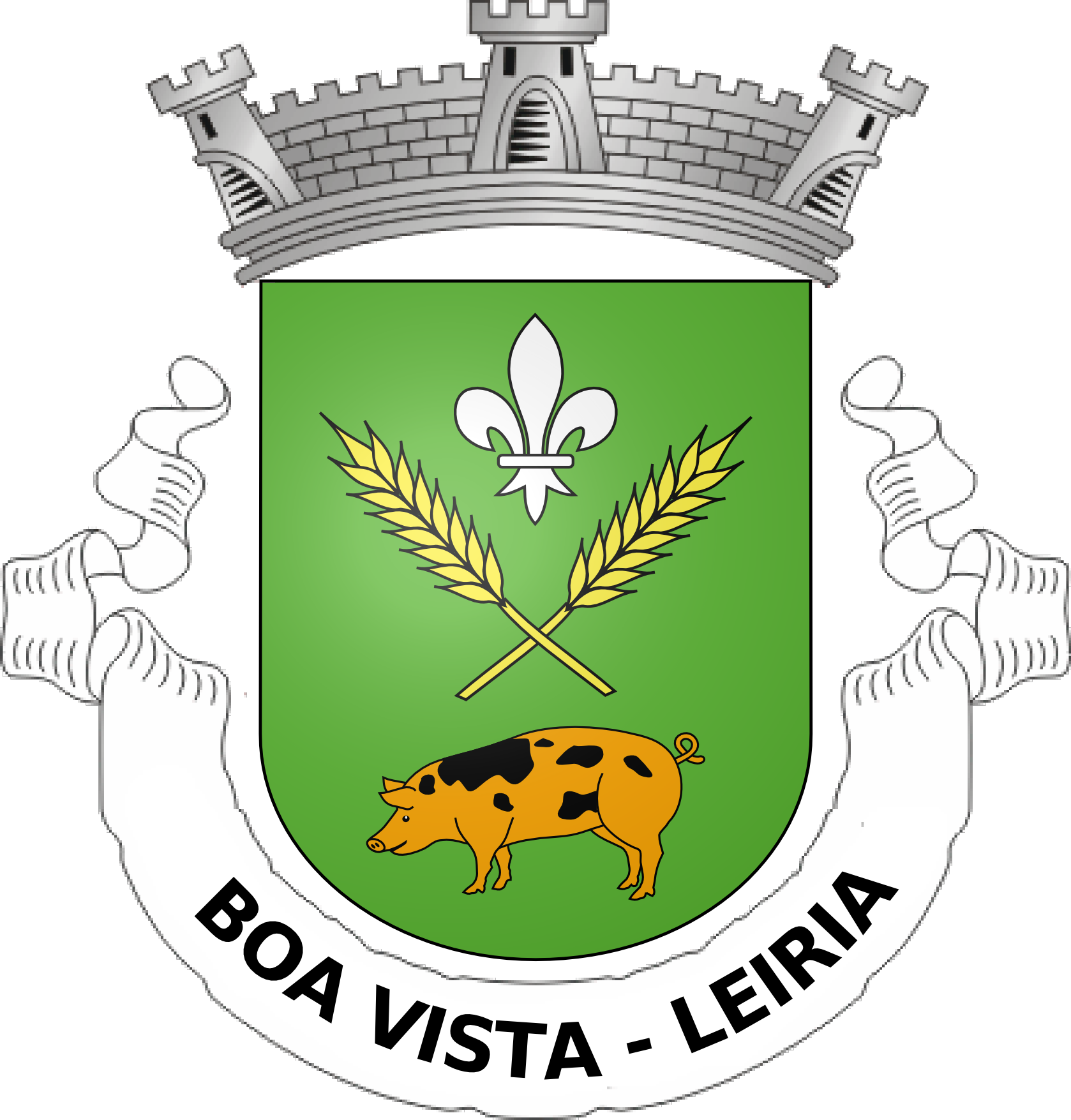 Blason de la commune de Boa Vista - Leiria (Portugal)